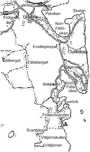 Karta över Ytterfälle och Fröland